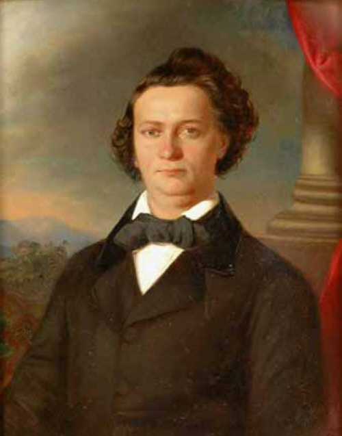 Bildnis Karl Treumann (1821–1877)